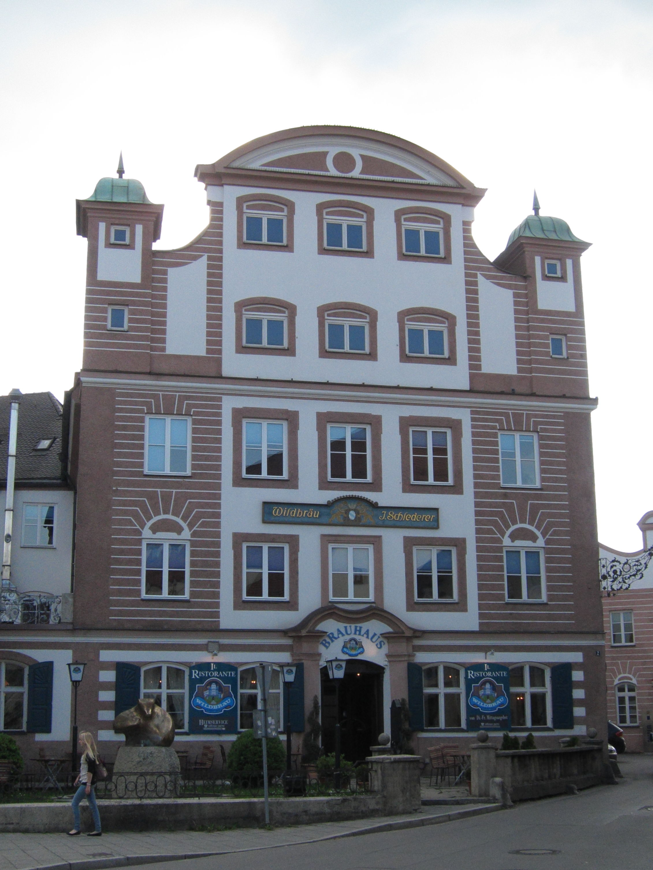 Ehem. Adelssitz, dann Sitz der Hofmark Eisendorf, im Kern angeblich 1616, neu gestaltet 1746 als dreigeschossiger barocker Bau mit vier Ecktürmchen und zweigeschossigem Segmentbogengiebel.